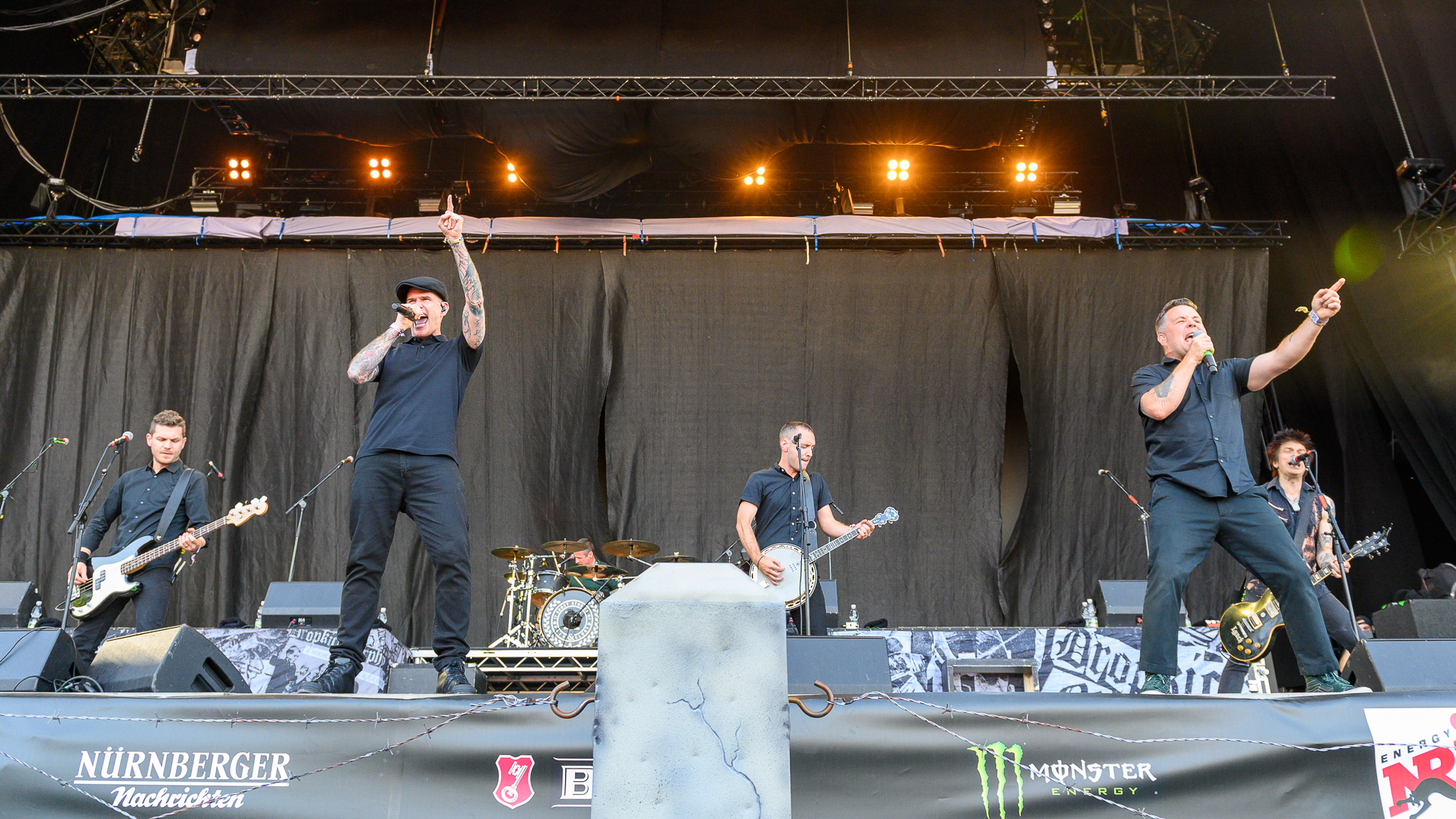 ARGO-Konzerte,Al Barr,Beck's Park Stage,Dropkick Murphys,James Lynch,Jeff DaRosa,Ken Casey,Konzert,Livekonzert,Livemusik,Matt Kelly,Musik,RiP,Rock im Park 2019